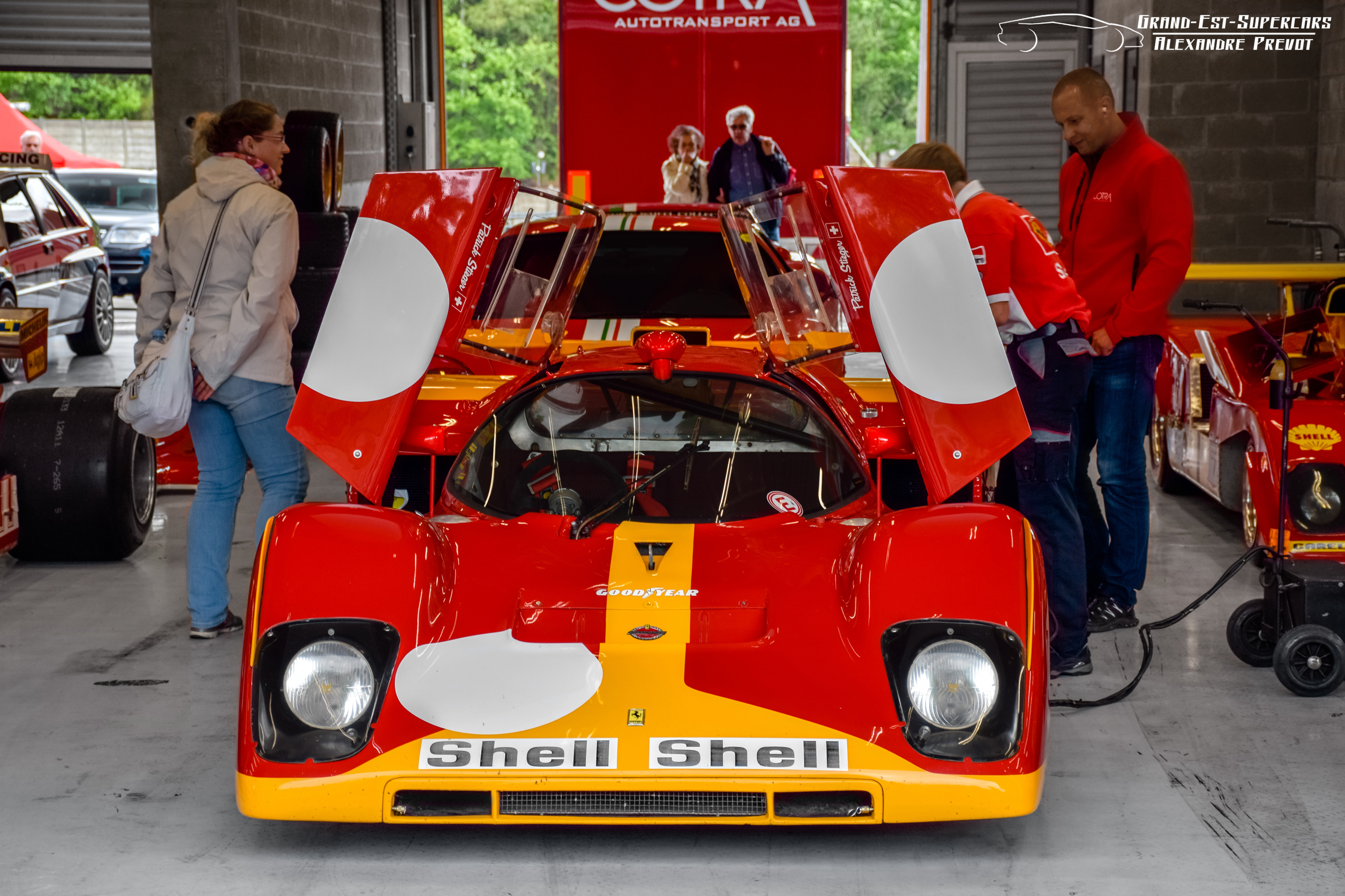 Année du modèle présenté : 1970 Châssis : n°1018